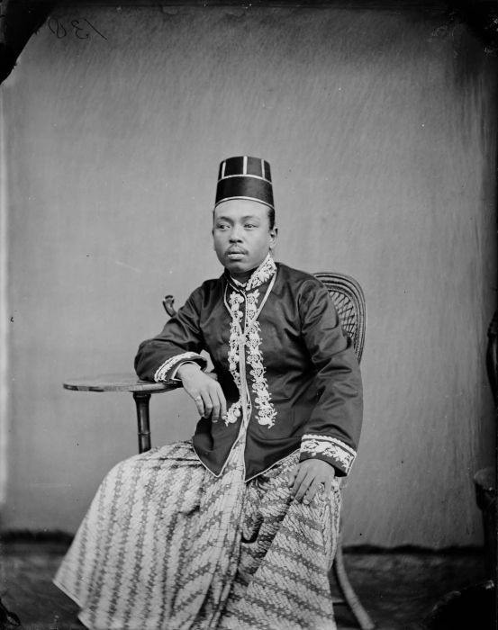 Repronegatief. Portret van een lokale bestuurder, Kareng, Probolinggo